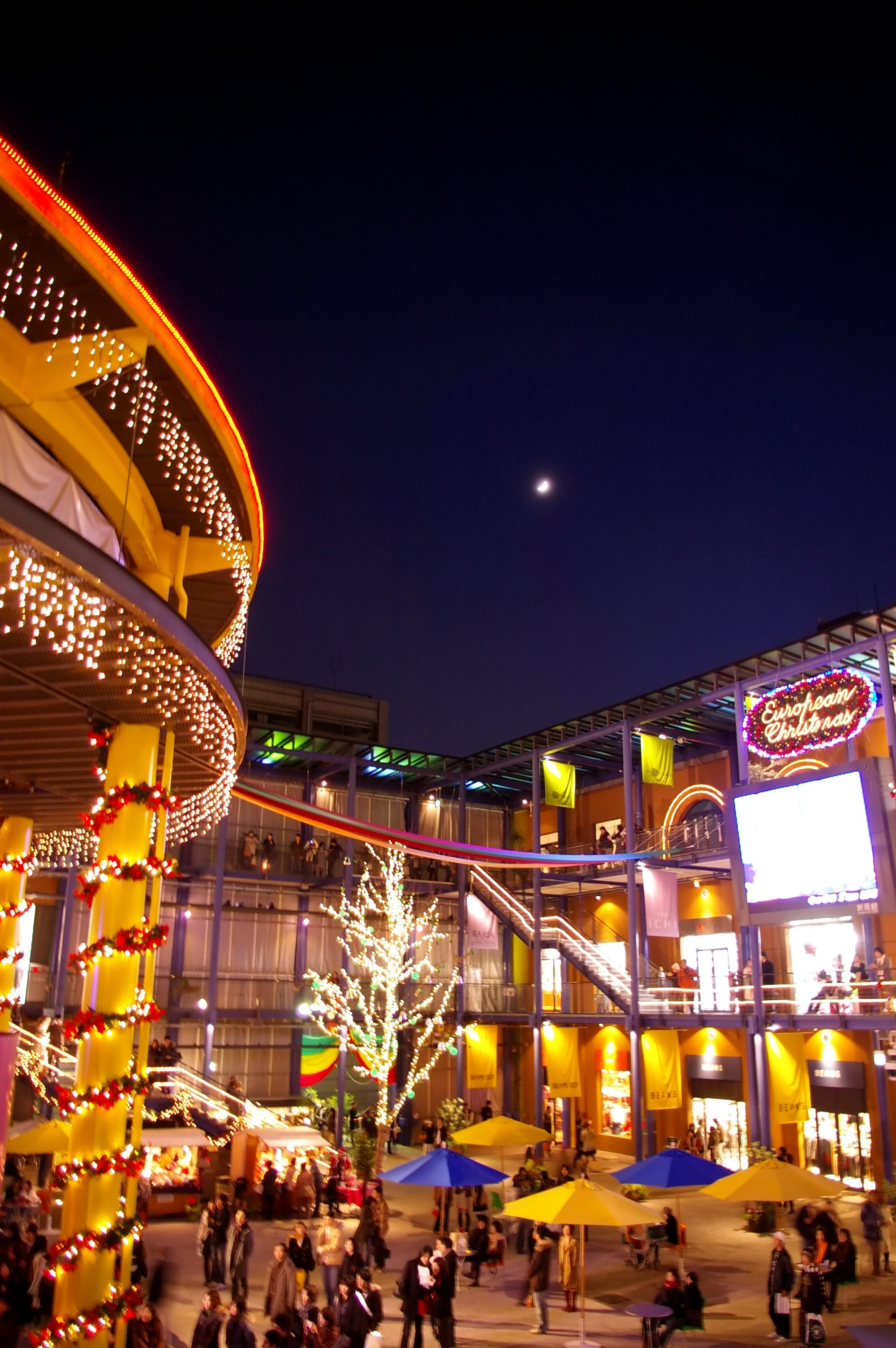 Shinpukan_Kyoto